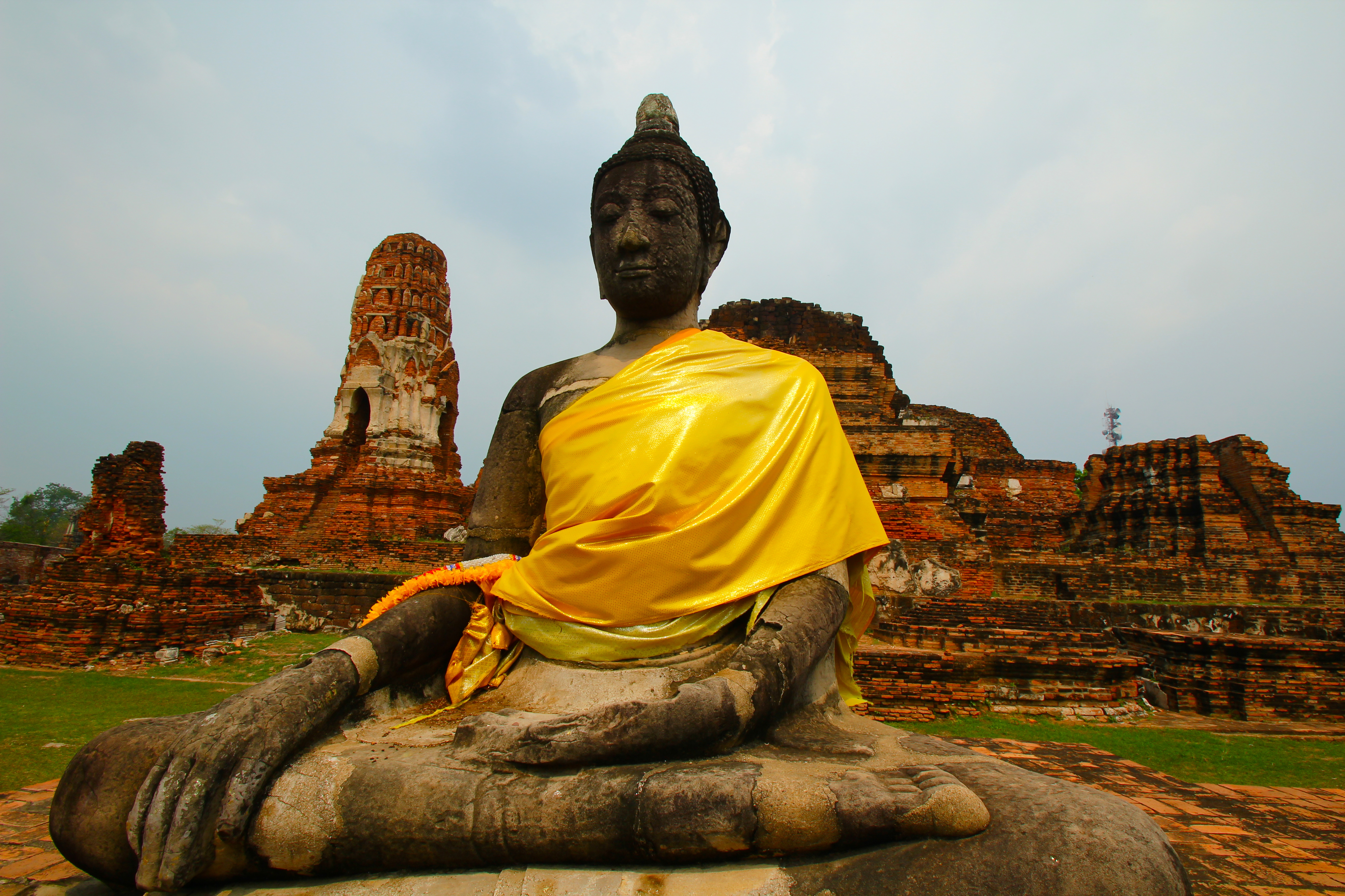 Statue de Bouddha Ayutthaya